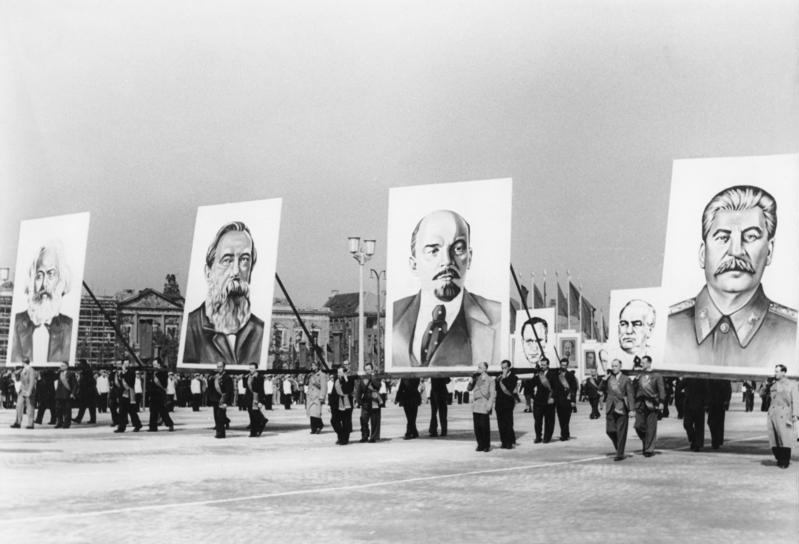 Berlin, Marx-Engels-Platz, Demonstration Zentralbild/Sturm 1. Mai 1953 - Kampftag der Werktätigen für Frieden, Einheit, Demokratie und Sozialismus Demonstration auf dem Marx-Engels-Platz in Berlin. UBz: An der Spitze des Demonstrationszuges: Die Bilder von Marx, Engels, Lenin und Stalin.